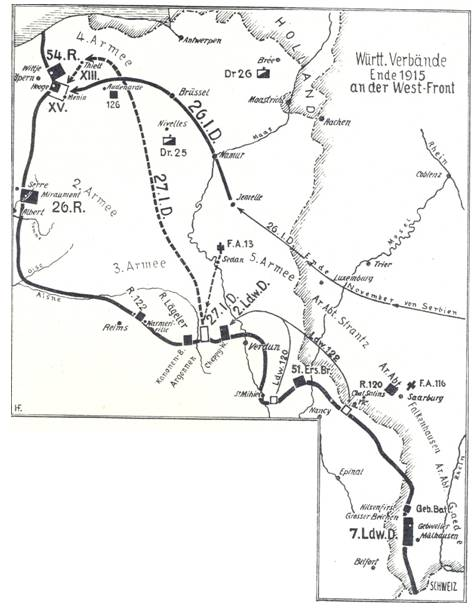 Karte: Württ. Berbände Ende 1915 an der Westfront